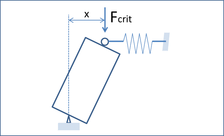 Fig. 3